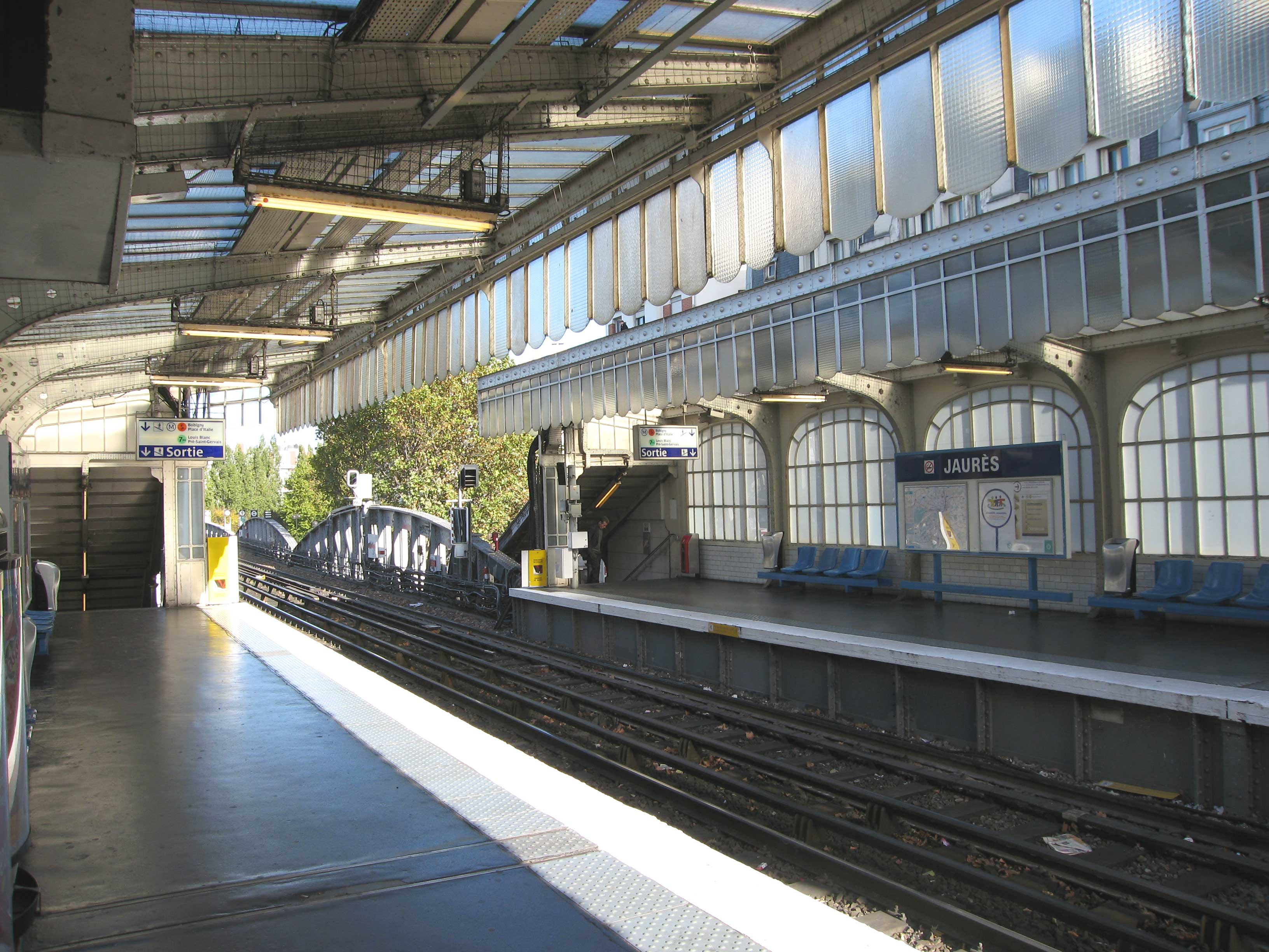 Métro de Paris, Station Jaures (ligne 2), Paris, France